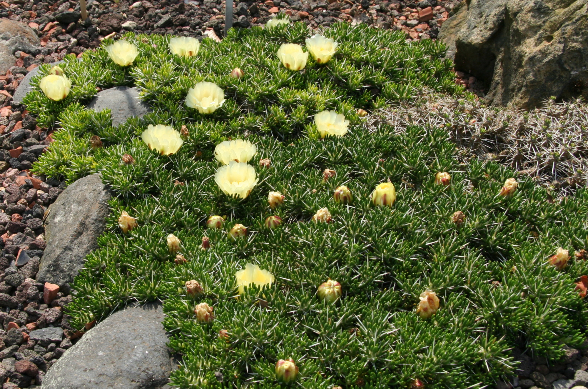 Maihuenia_poeppigii im Botanischen Garten Dresden